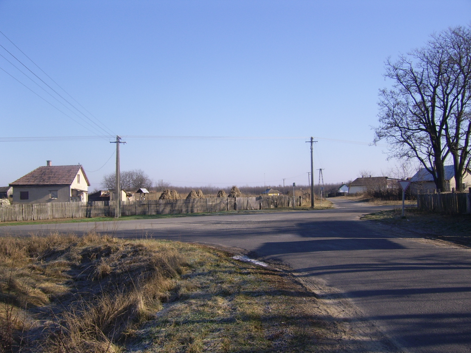 A 4102-es út (balról jobbra) és a 49137-es út (fentől lefelé) kereszteződése Nagykecskésnél (Balkány)